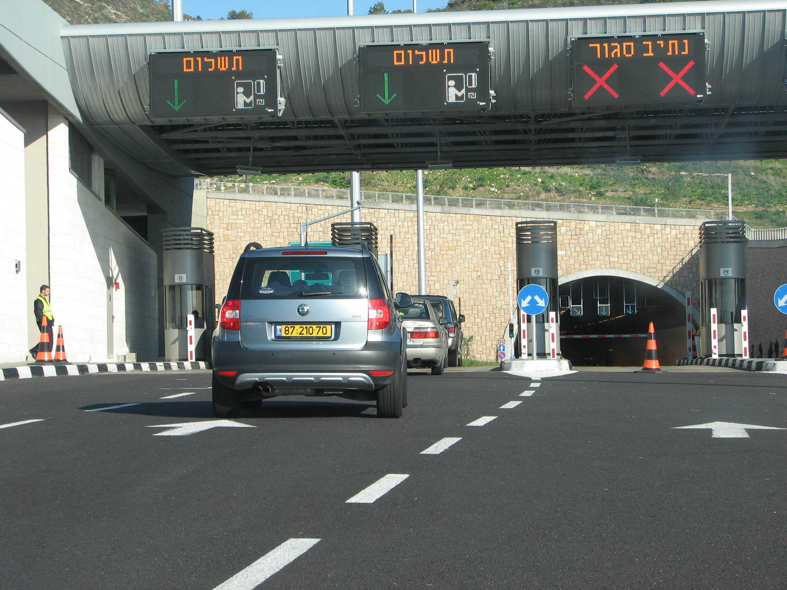 Carmel Tunnels in Haifa, Israel מנהרות הכרמל בחיפה, ישראל West entrance of Carmel Tunnels in Haifa, Israel. Cfar Samir entrance כניסה למערות הכרמל מצד מערב , מכפר סמיר